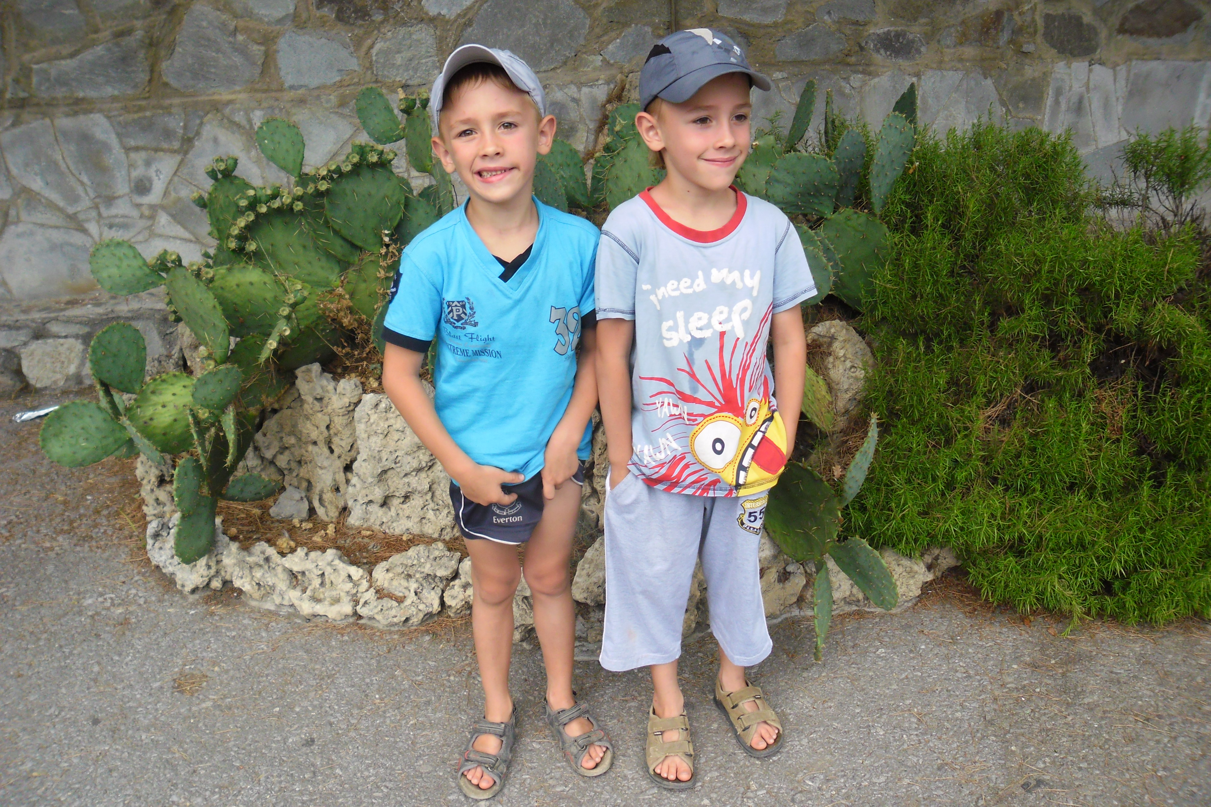 Фото